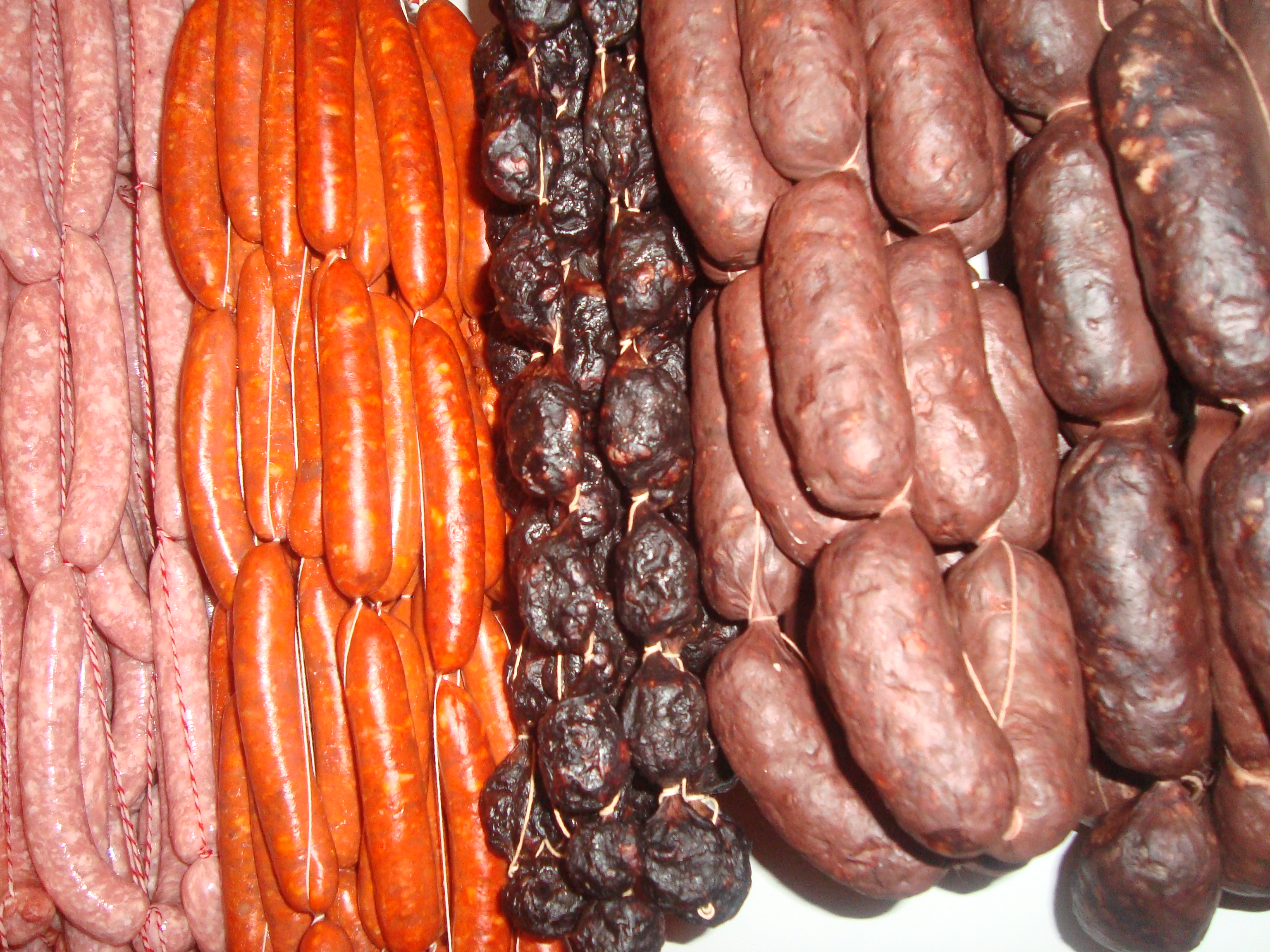 Embutidos frescos (Gastronomia de Torreblanca)